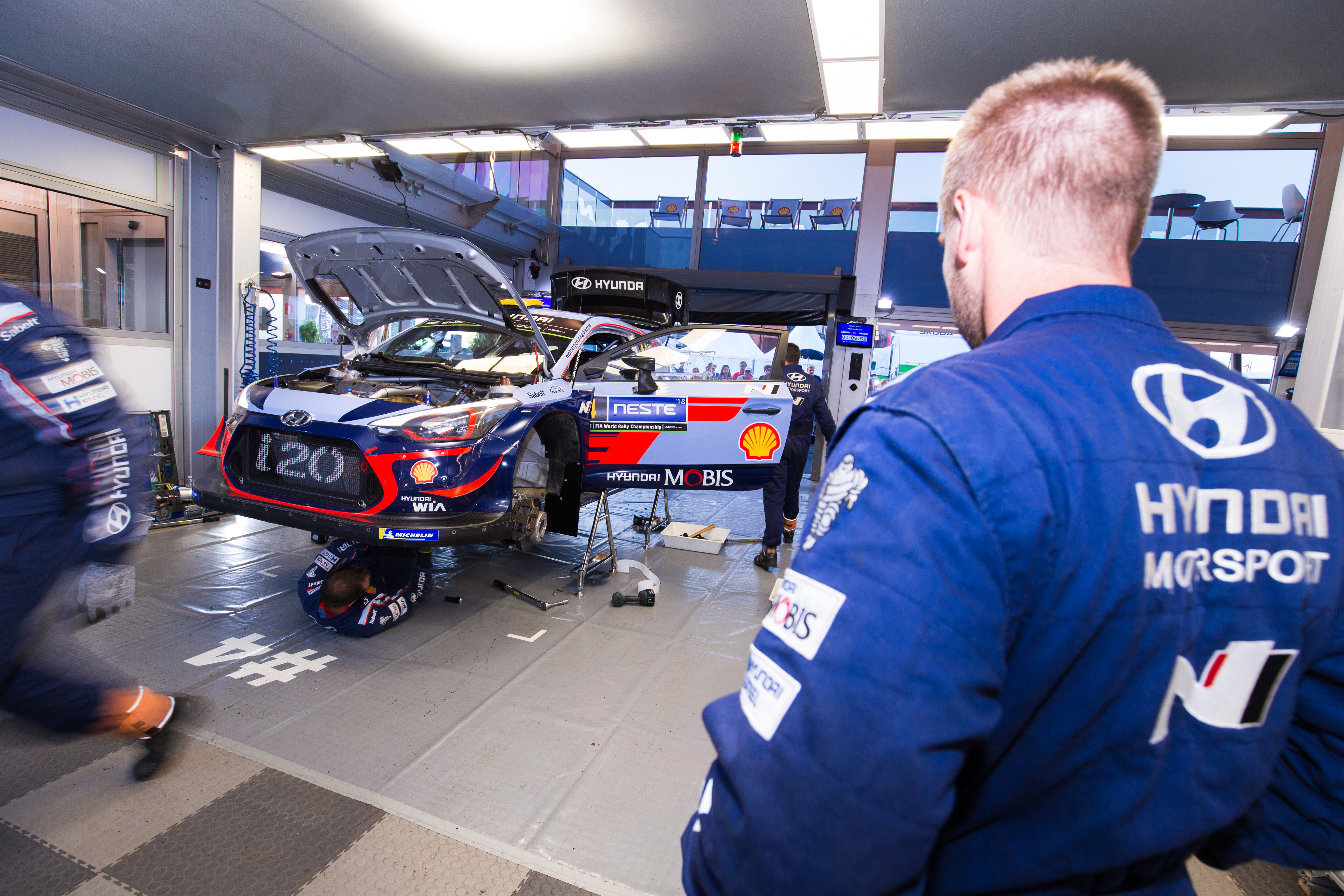 Rajd Finlandii 2018 Hyundai Motorsport